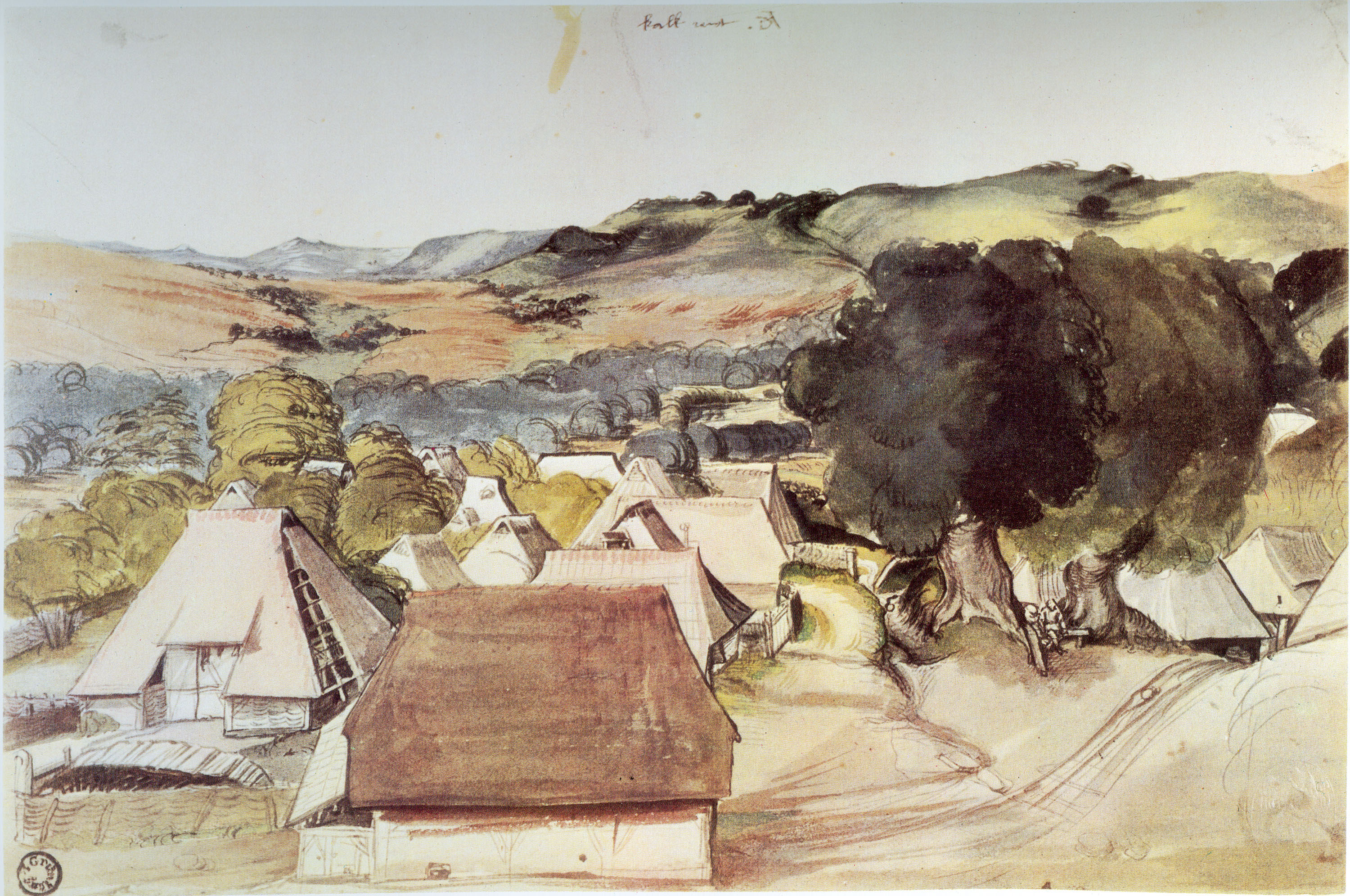 Dürers Ansichten von Nürnberg, Kalchreuth und Trient gelten als erste autonome Landschaften in der Kunst